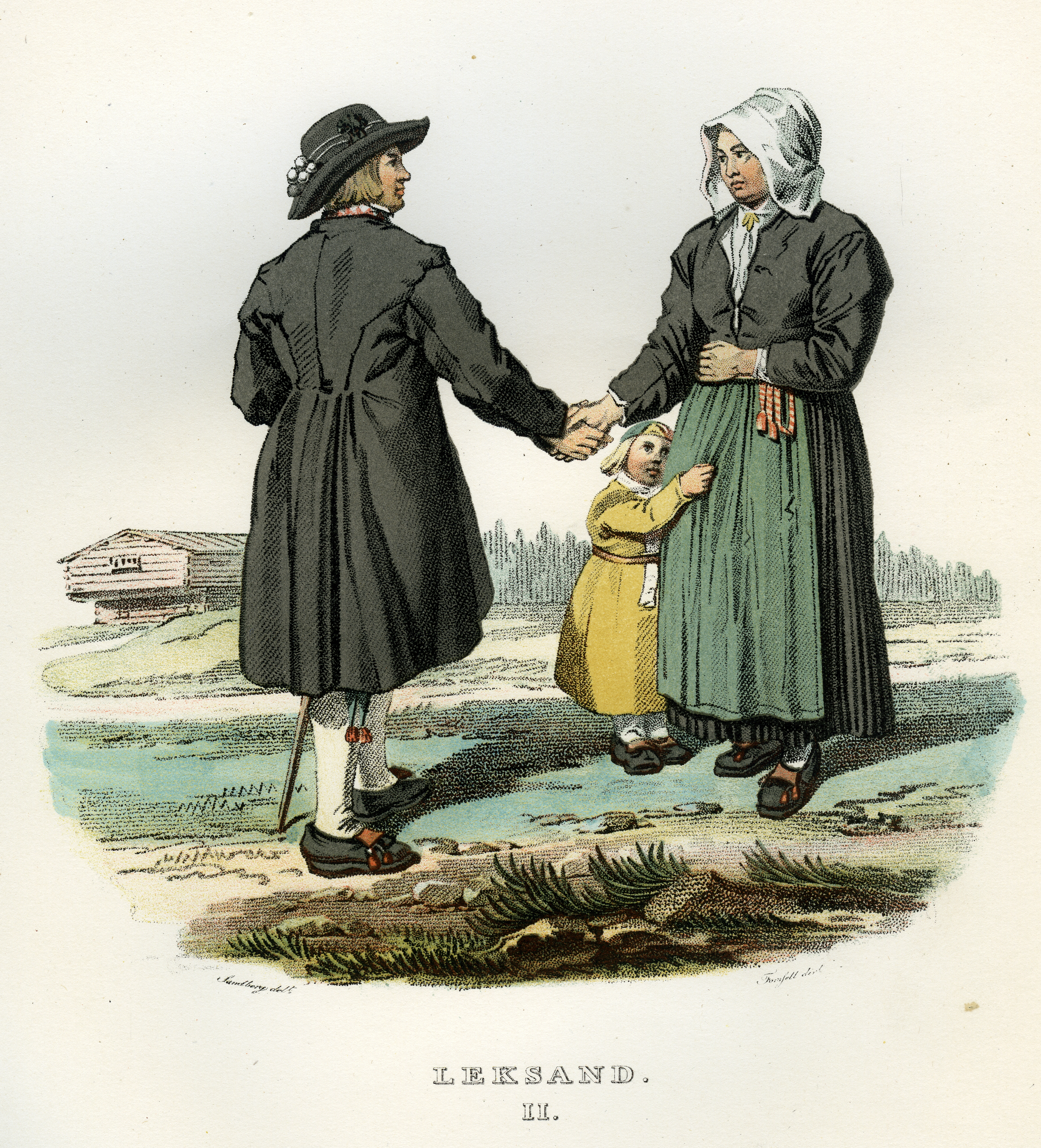 Folkdräkter från Leksand, Dalarna, Sverige. Illustration ur Ett år i Sverige. Taflor af Svenska Almogens klädedrägt, lefnadssätt och hemseder, samt de för landets historia märkvärdigaste orter (1864) tecknade av Johan Gustaf Sandberg.